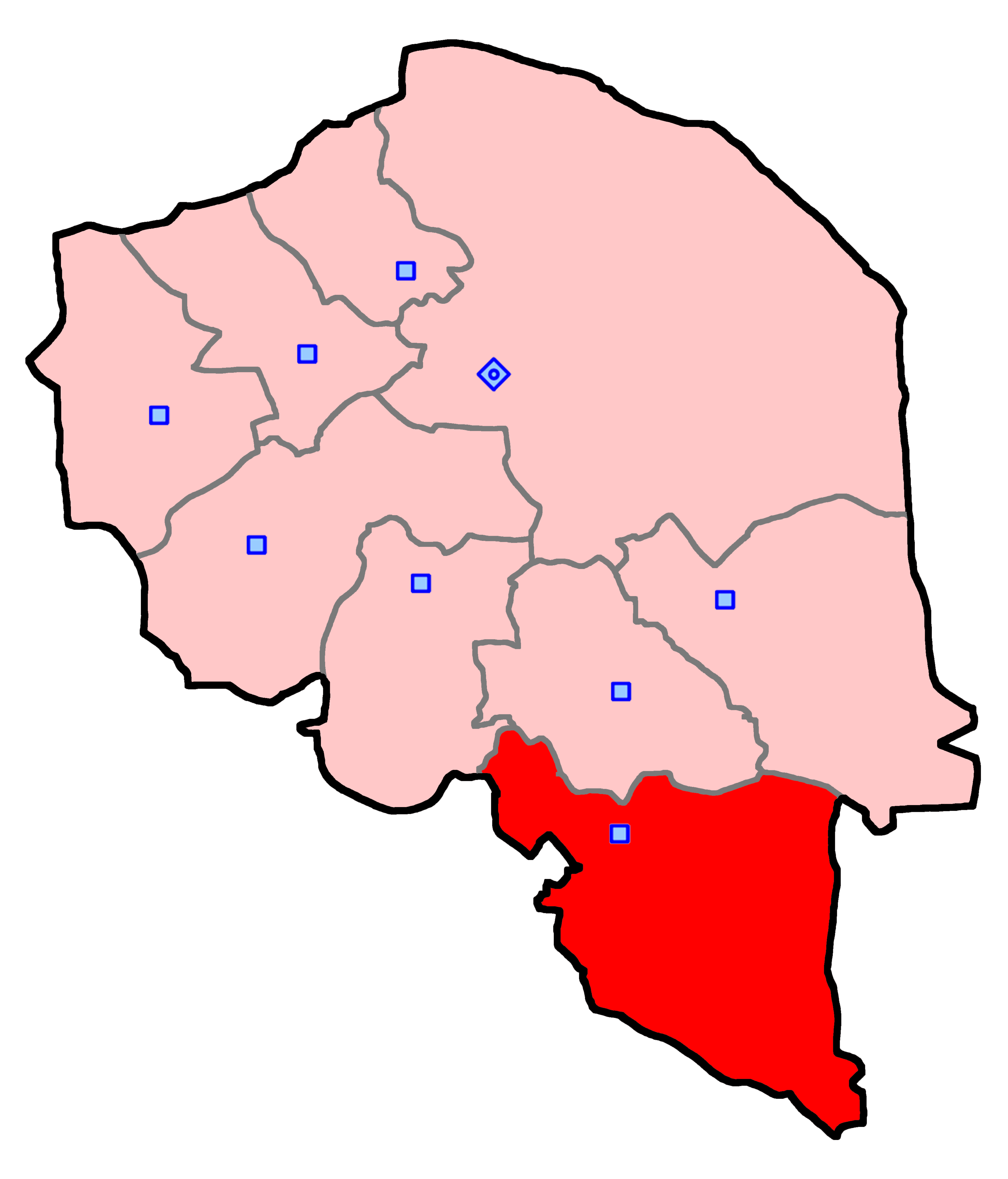 کهنوج، رودبار جنوب، فاریاب، قلعه‌گنج و منوجان برای انتخابات مجلس شورای اسلامی